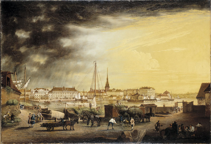 Utsigt öfver Rådhuset, Riddarhuset samt Riddarholmen från Rödbotorget 1768. Material och teknik: Olja Underlag: Duk Mått i mm: 790x1150